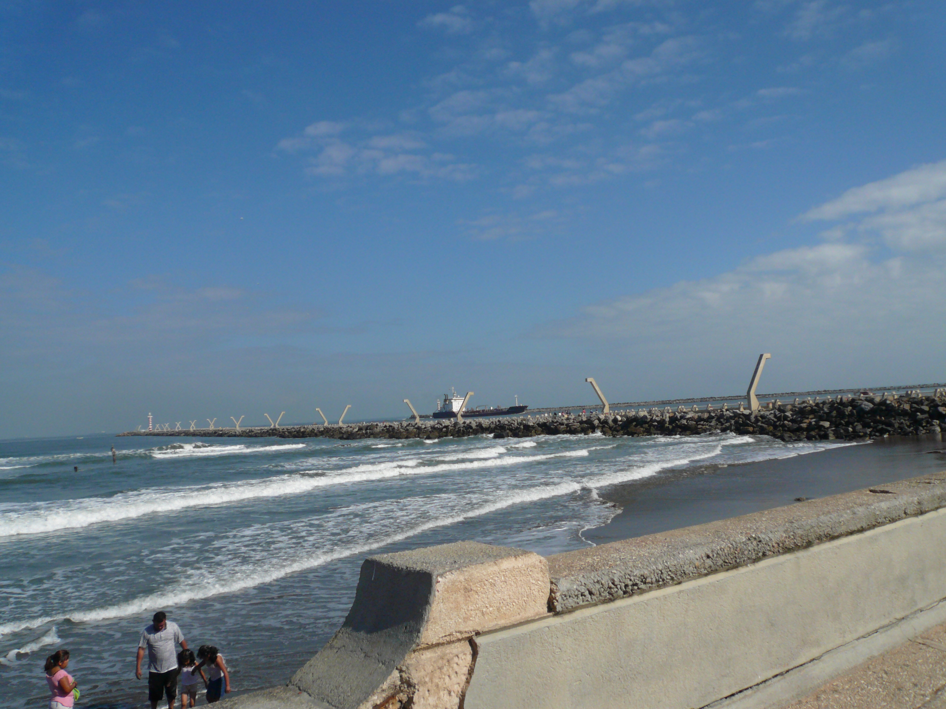 Coatzacoalco Veracruz port entry.